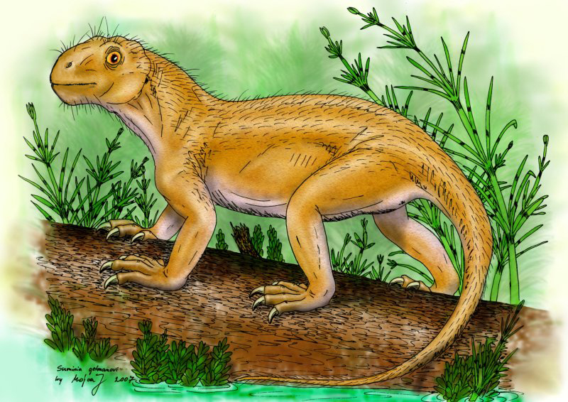 Suminia getmmanovi, a small russian venyukoviamorph